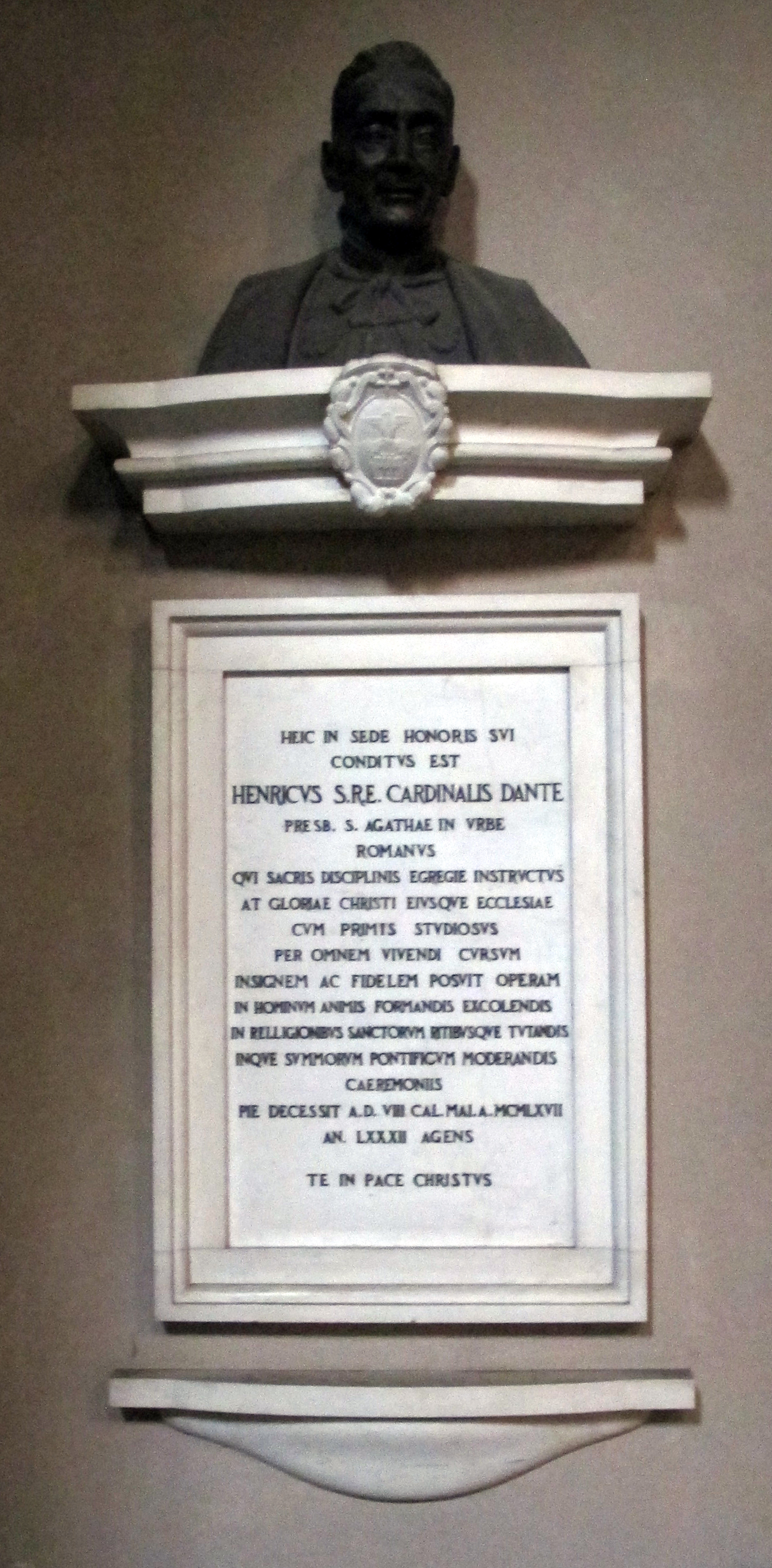 Sant'agata dei goti, monumento al cardinale enrico dante (m. 1967)